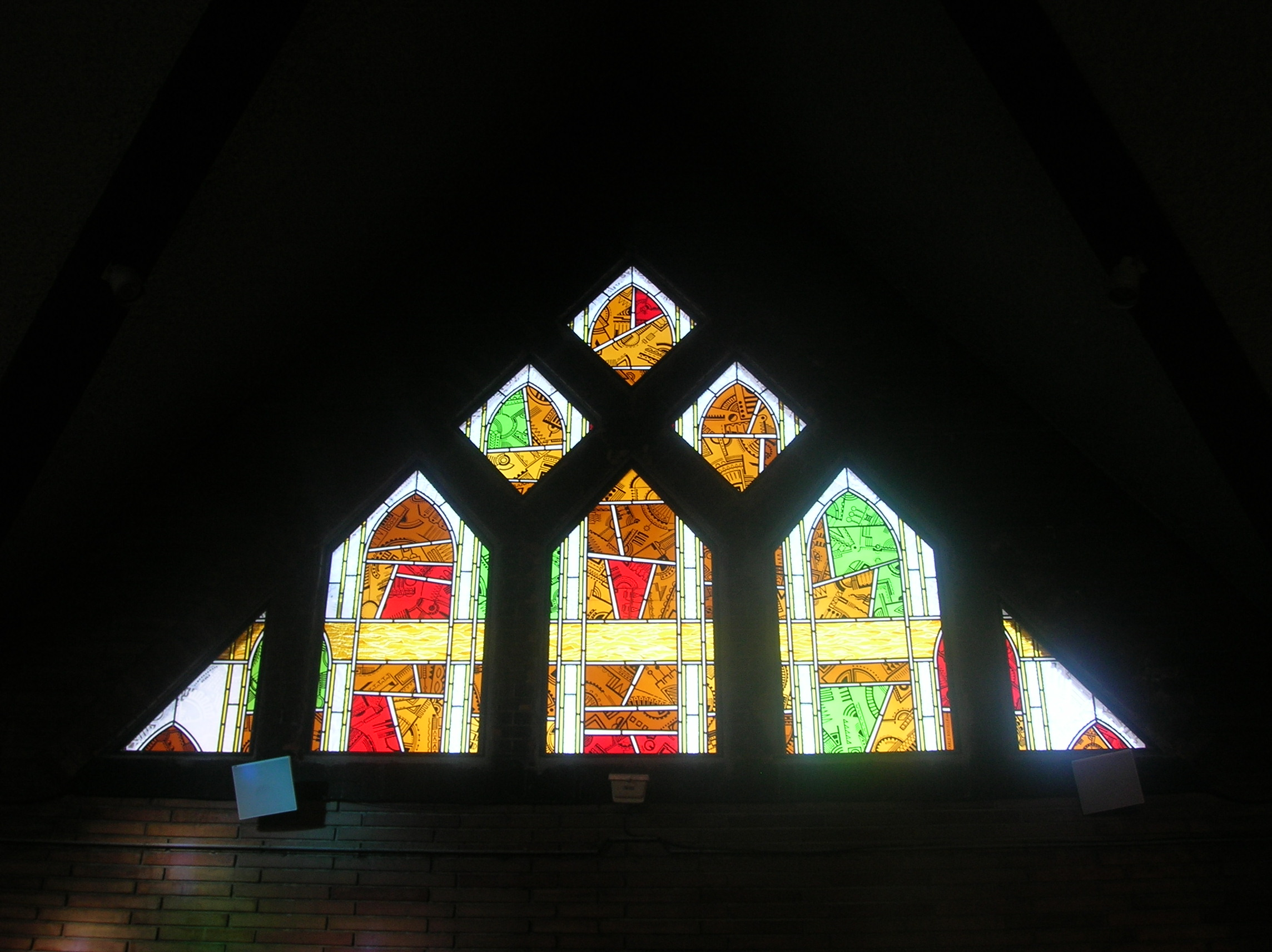 Vitraux de la Trinité à Issy-les-Moulineaux : le Saint-Esprit. Verrier : Carlo Roccella. Bénits de 12 octobre 2007.